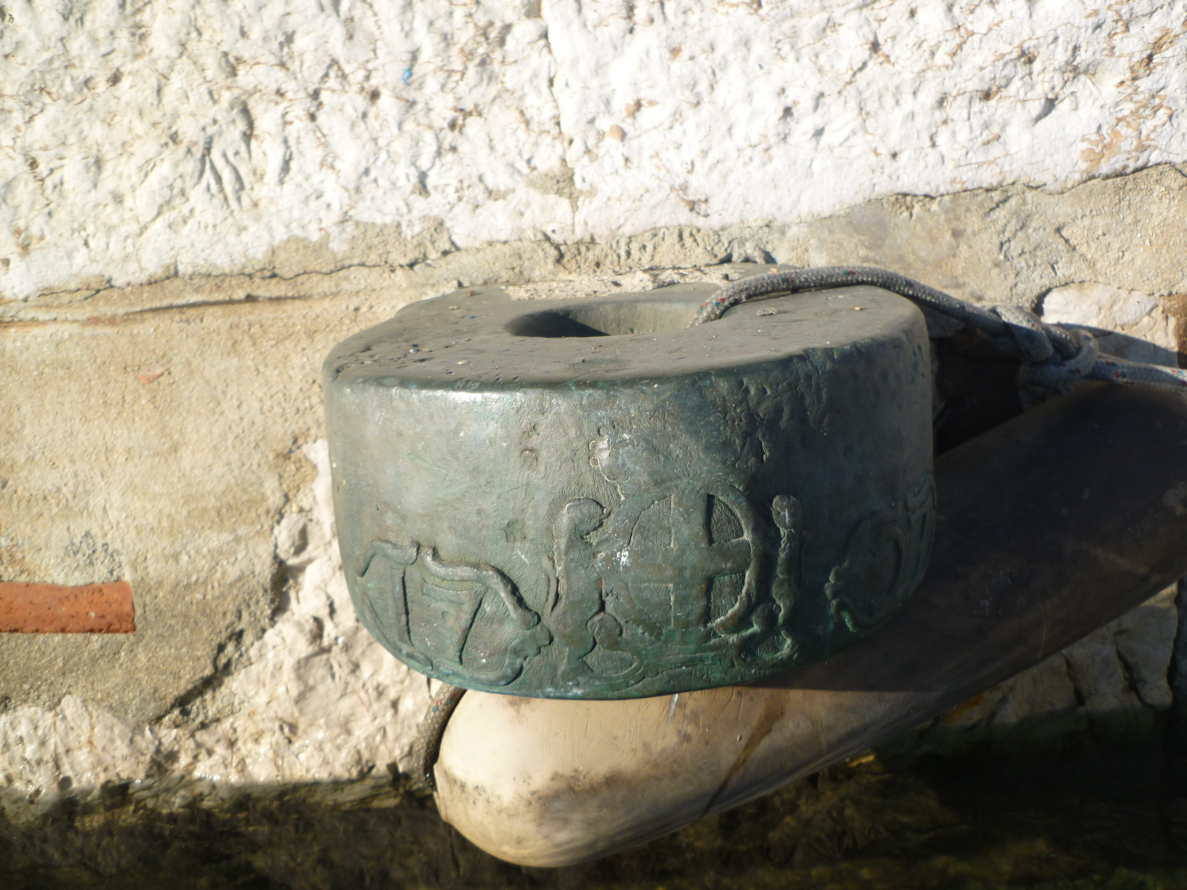 Darse de Villefranche-sur-Mer : Anneau du XVIII° siècle